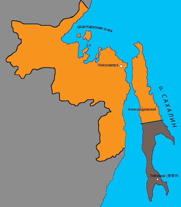 Карта территории Сахалинской области в 1914-1920 годах